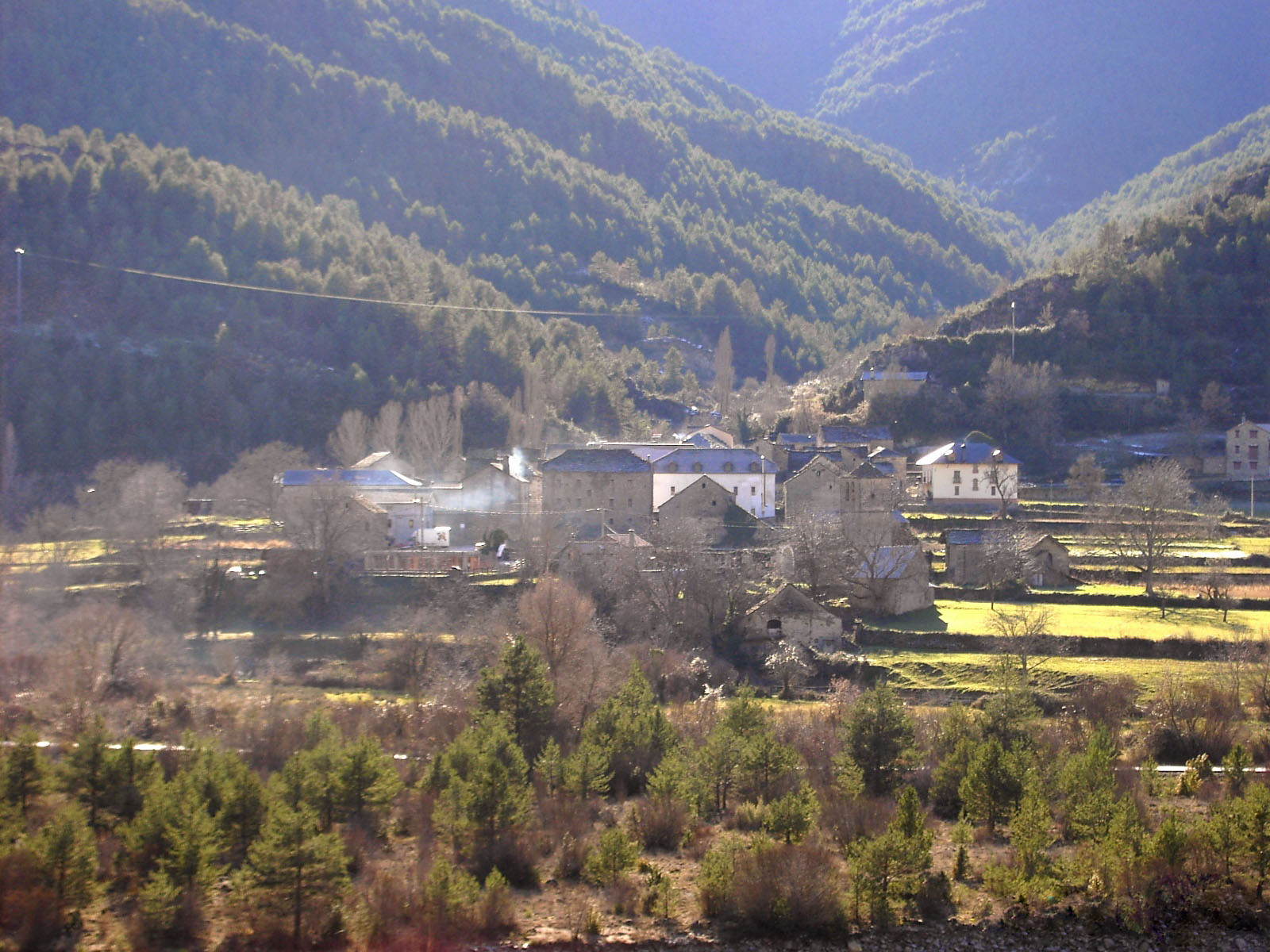 Ligüerre de Ara, en el valle del Ara, perteneciente al municipio de Fiscal.